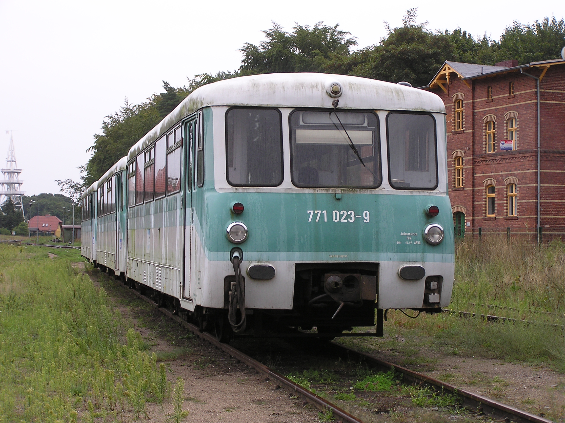 (im Bahnhof Heringsdorf/Usedom)